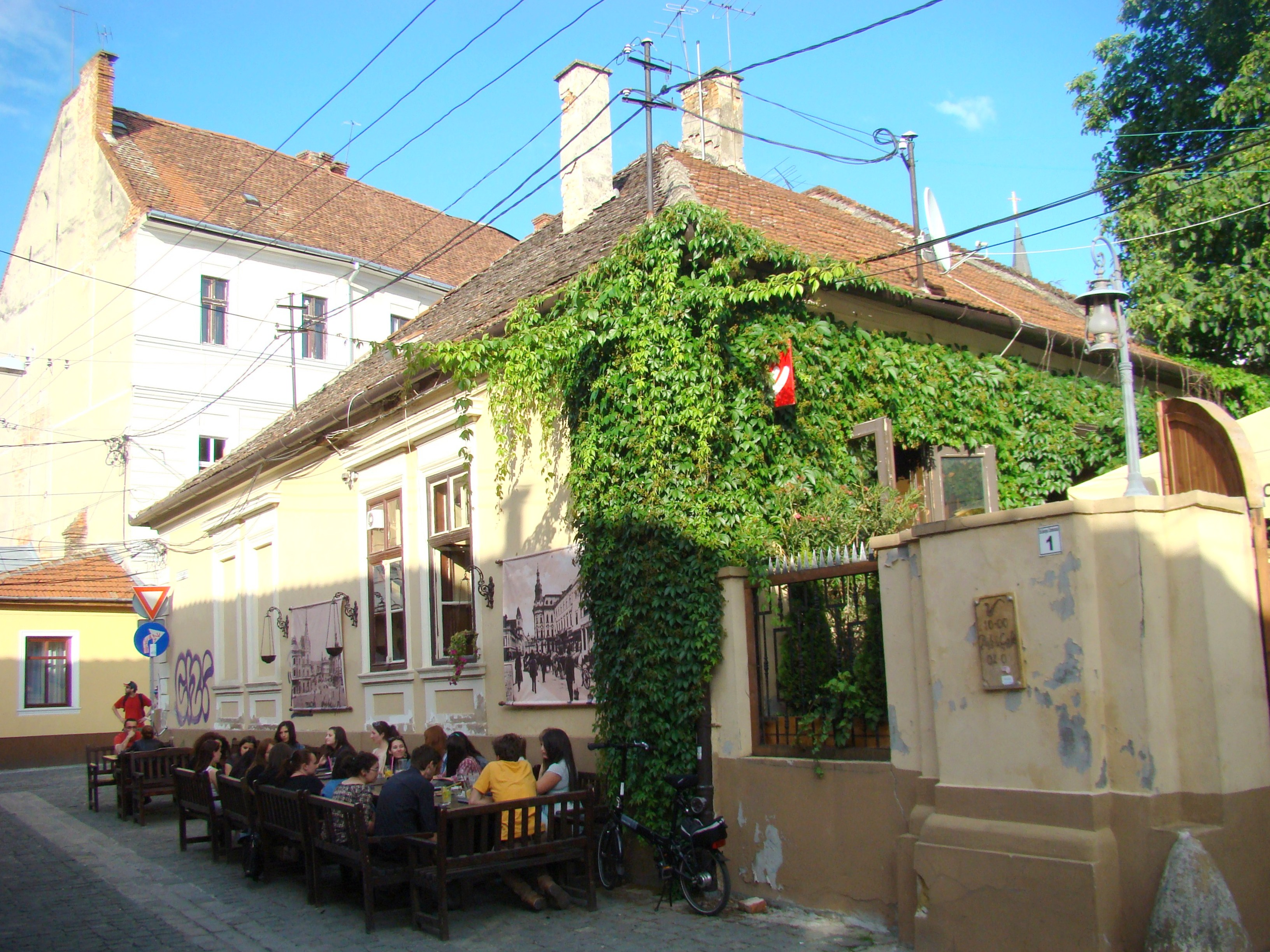 Clădire monument istoric, str.Clemenceau Georges 1